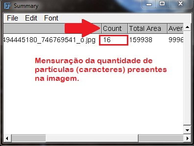 Mensuração da quantidade de partículas na imagem pelo software FIJI.